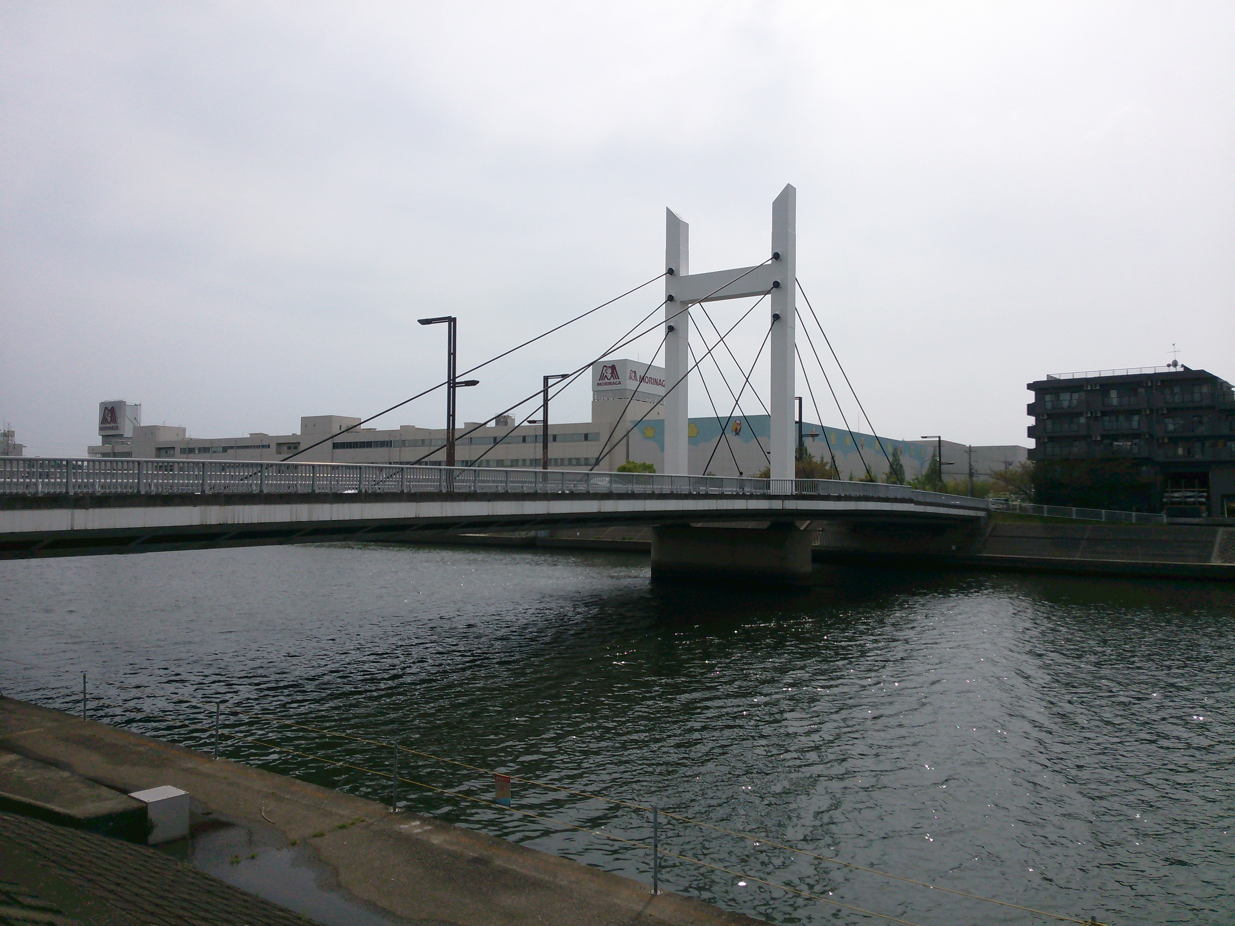 神奈川県横浜市鶴見区、森永橋